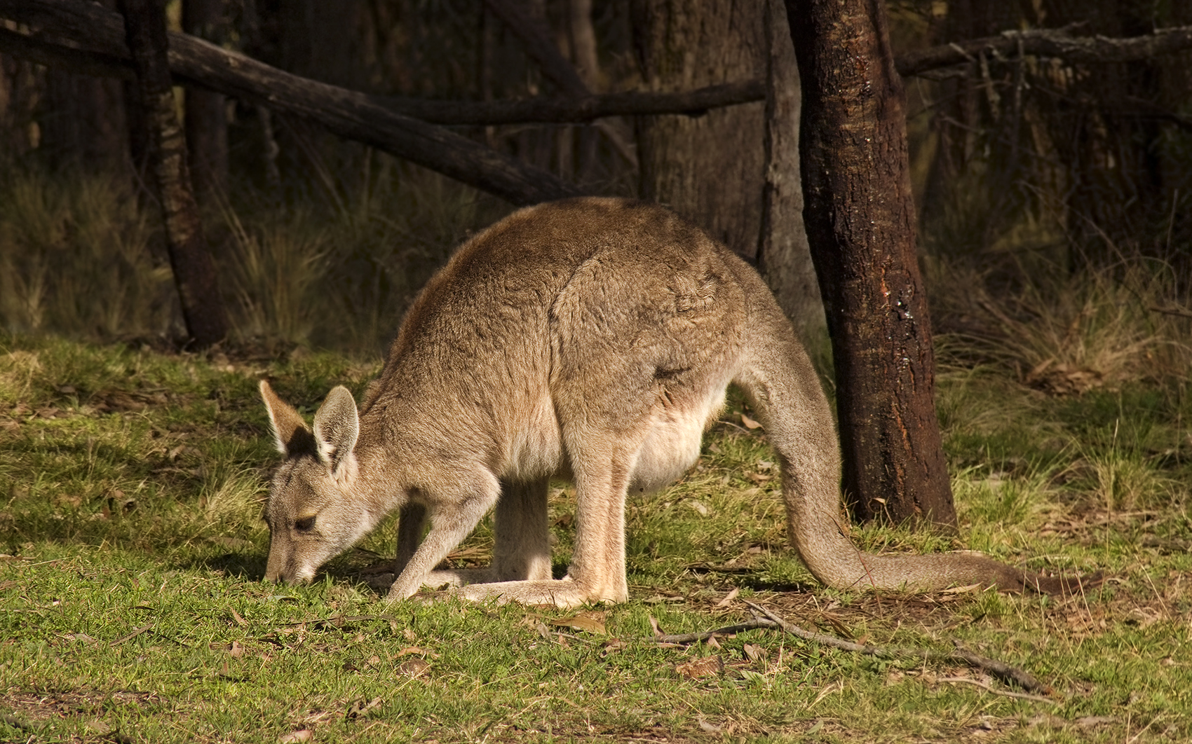 An Eastern grey kangaroo female grazing, Macropus giganteus